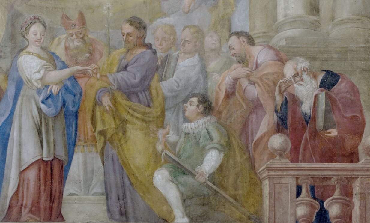 St. Jakob Straubing -Wandfresko